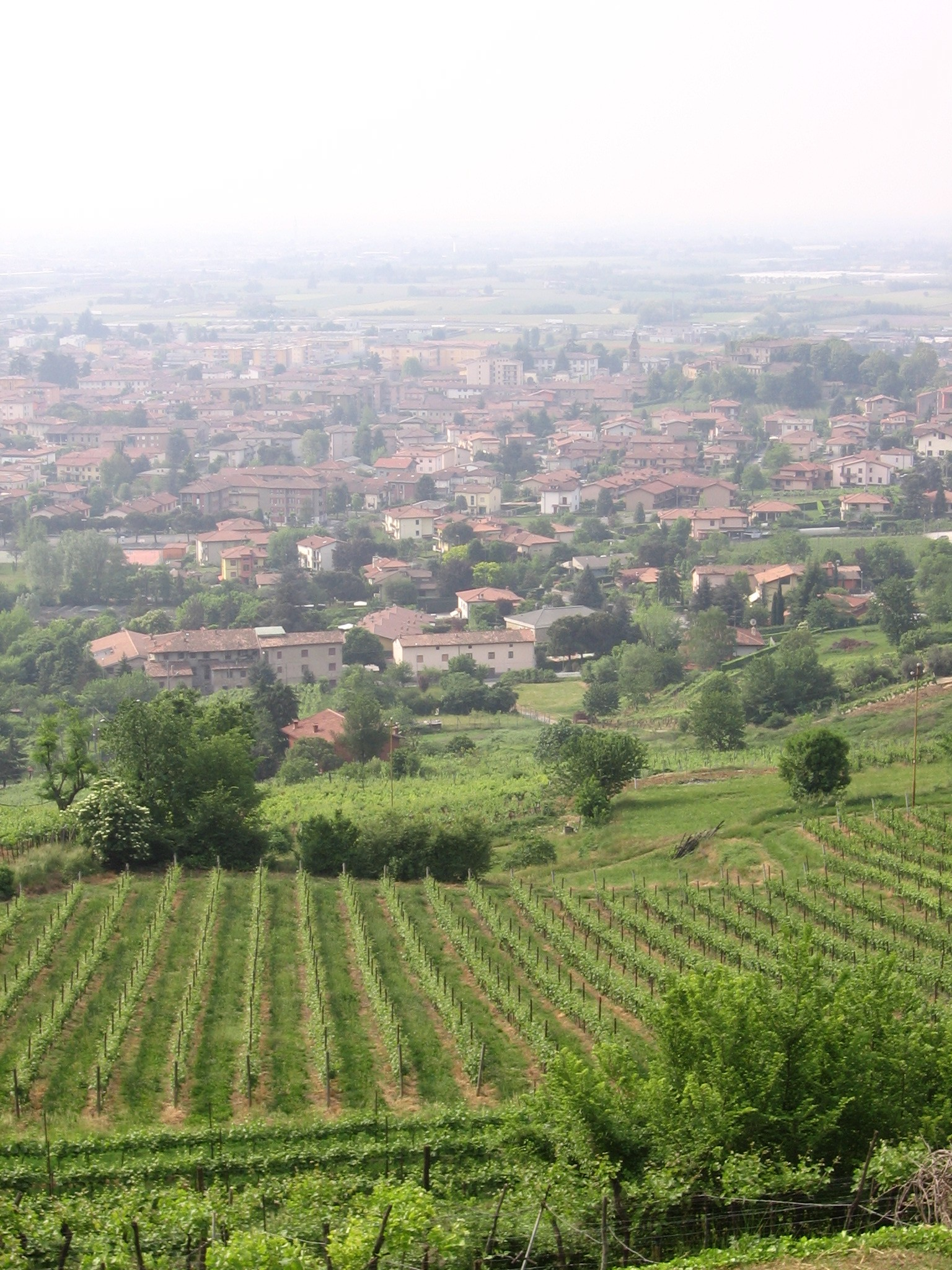 Grumello del monte, Bergamo, Italia